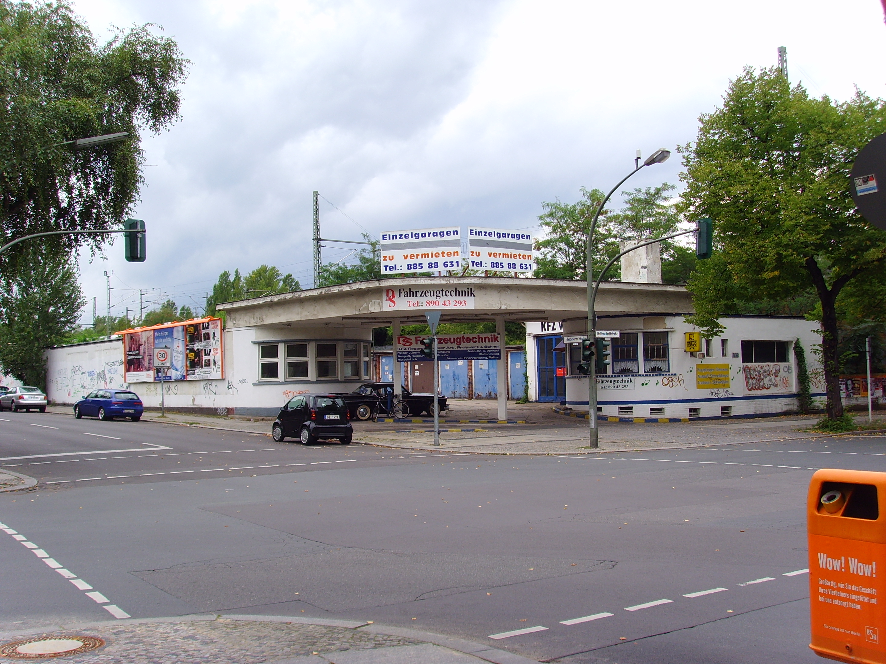 Holtzendorff-Garage, Ecke Heilbronner Straße 12 und Holtzendorffstraße